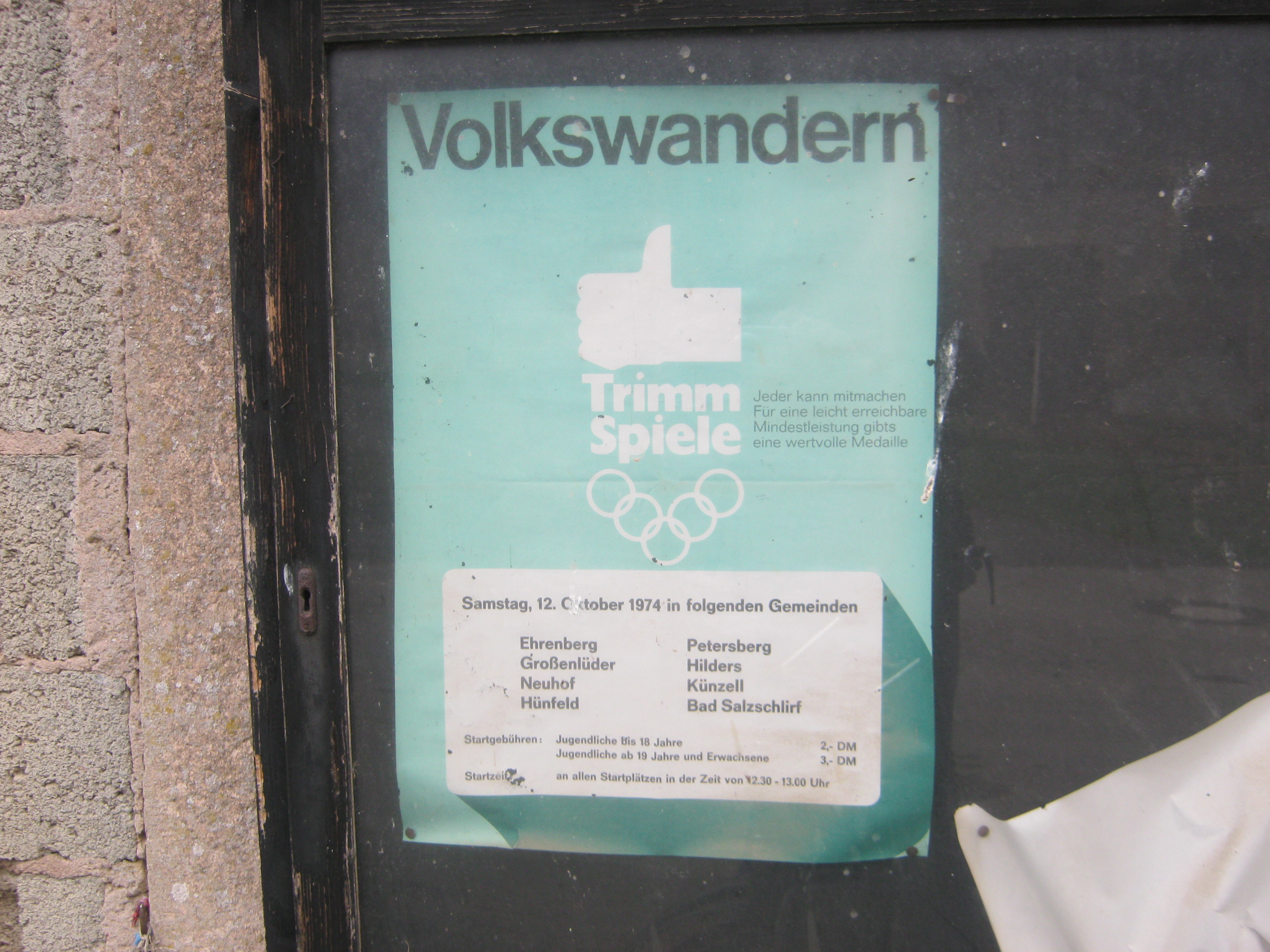 Hinweisplakat zum Volkswandern von 1974, hing 2014 immer noch in einem Kasten für öffentliche Bekanntmachungen in Ebersburg